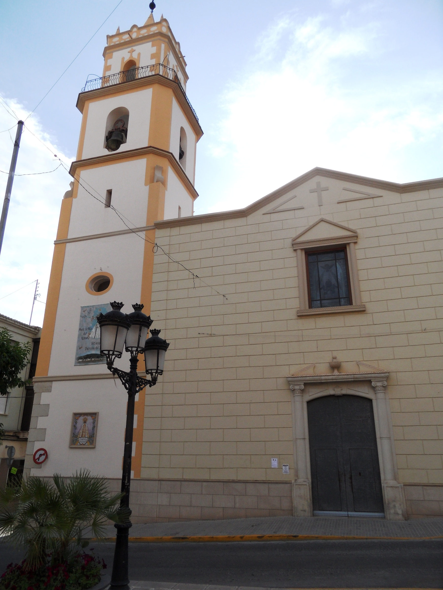 Església parroquial del Pinós.